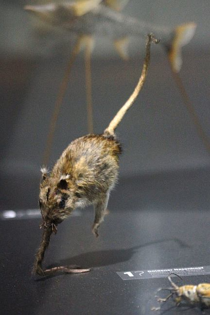 Rekonstruktion von Hopsorrhinus aureus im Naturkundemuseum Wiesbaden